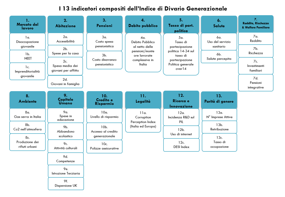 Tassonomia dell'Indice di Divario generazionale, composto da 13 indicatori e 36 sottoindicatori.